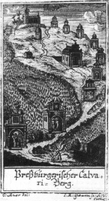 Die einzelnen Kapellen und Stationen des ehemaligen Kalvarienberges.